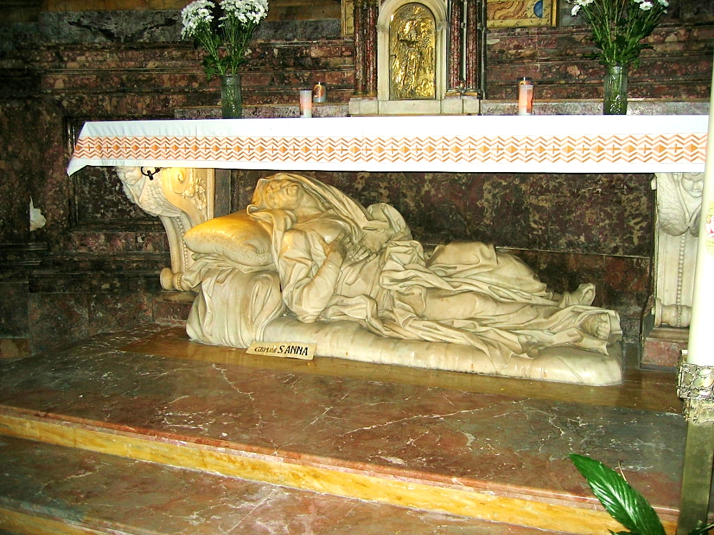 Giovanni Battista Maini – Saint Anne (1750-1752), Sant'Andrea delle Fratte, Roma.